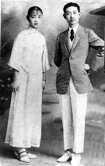 中文（台灣）: 孟小冬和梅蘭芳夫婦的舊照片